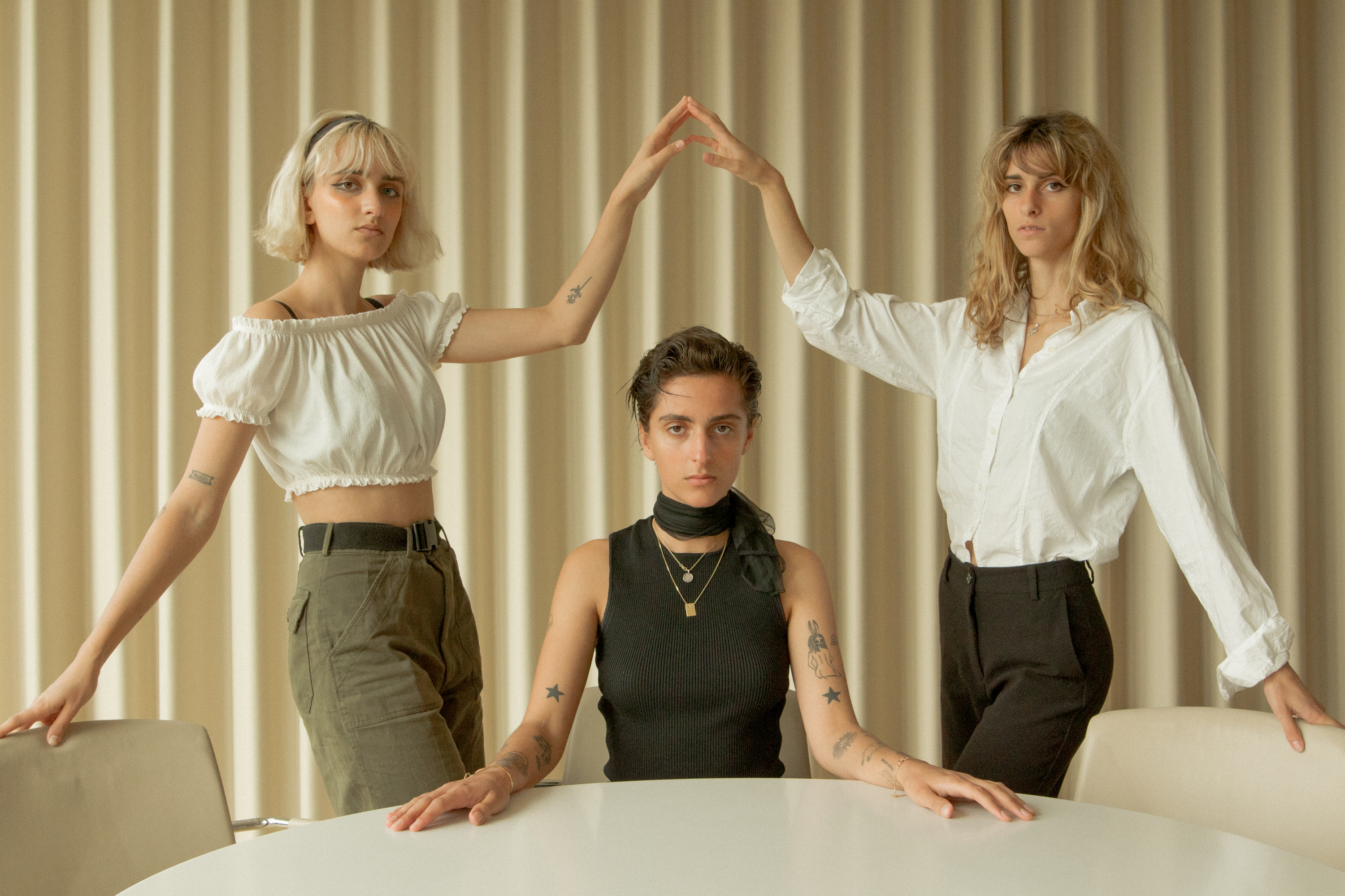 Velvet Volume press photo by Daniel Aude